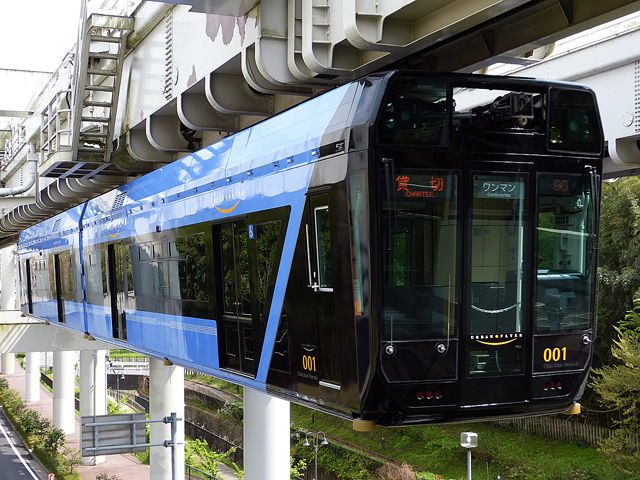 千葉都市モノレール・Urban Flyer 0-type 動物公園駅にて撮影。営業開始前の試運転の模様。